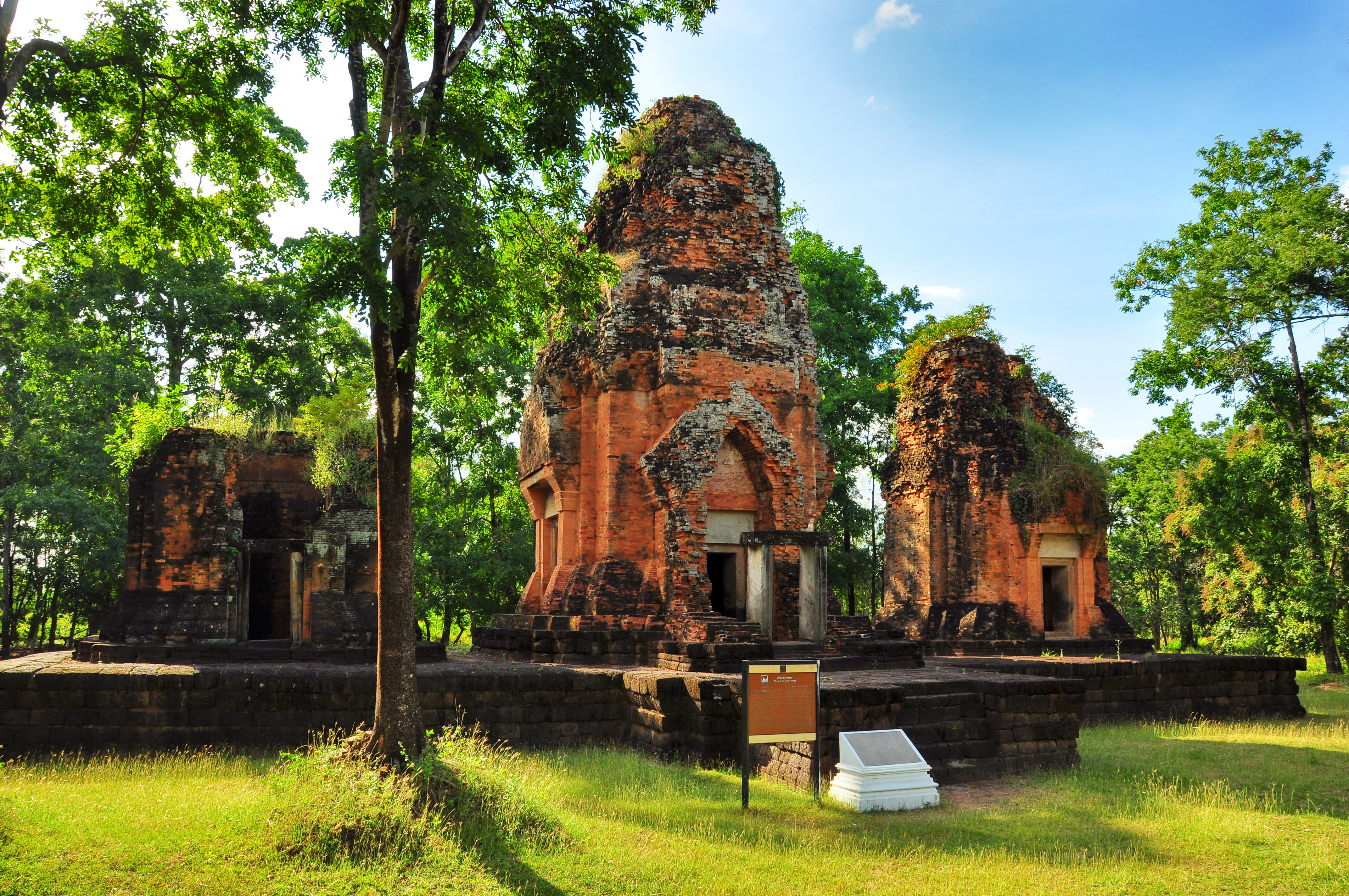 กู่สวนแตง